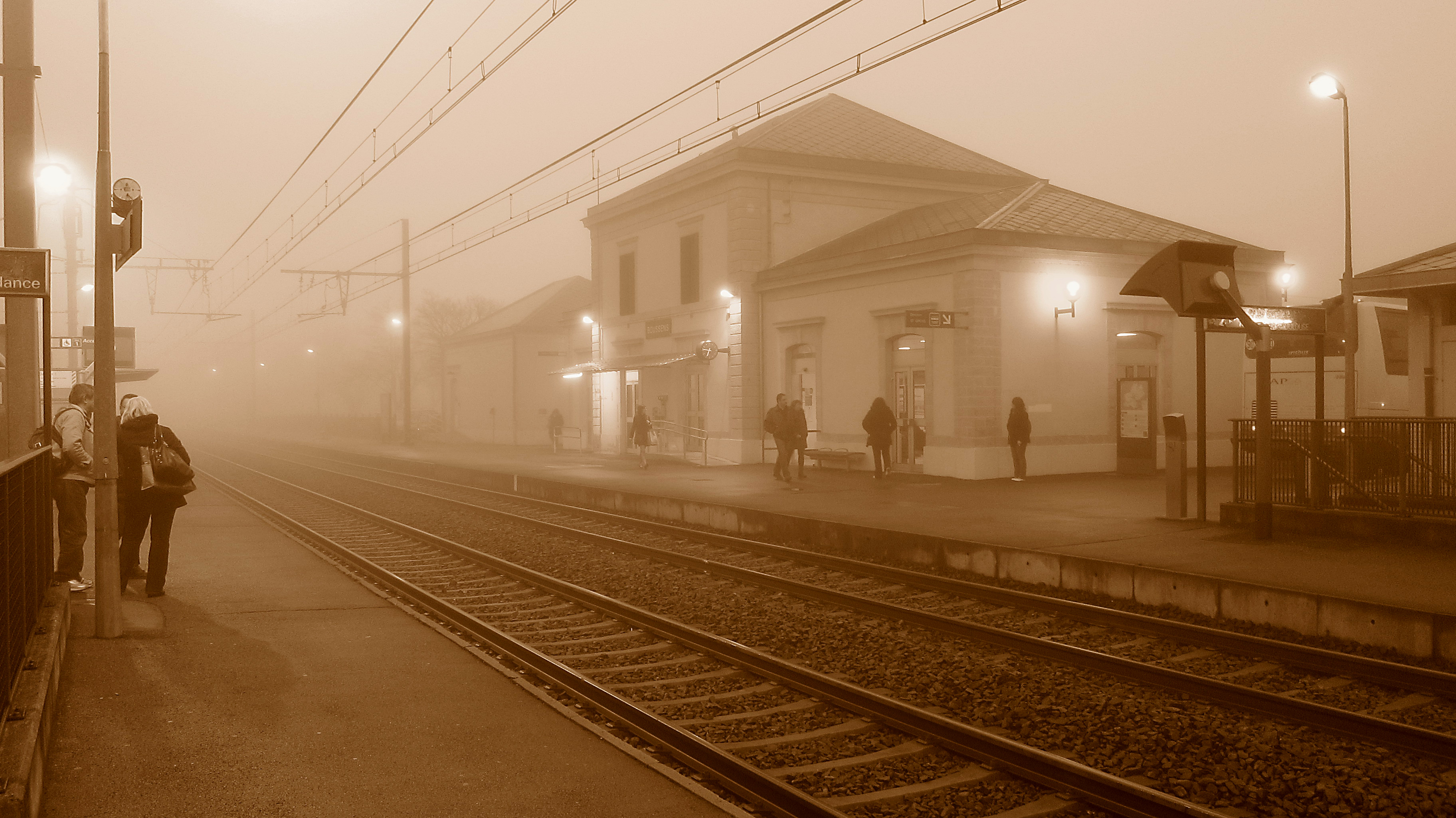 Boussens (Haute-Garonne, Midi-Pyrénées, France) : La gare dans le brouillard.